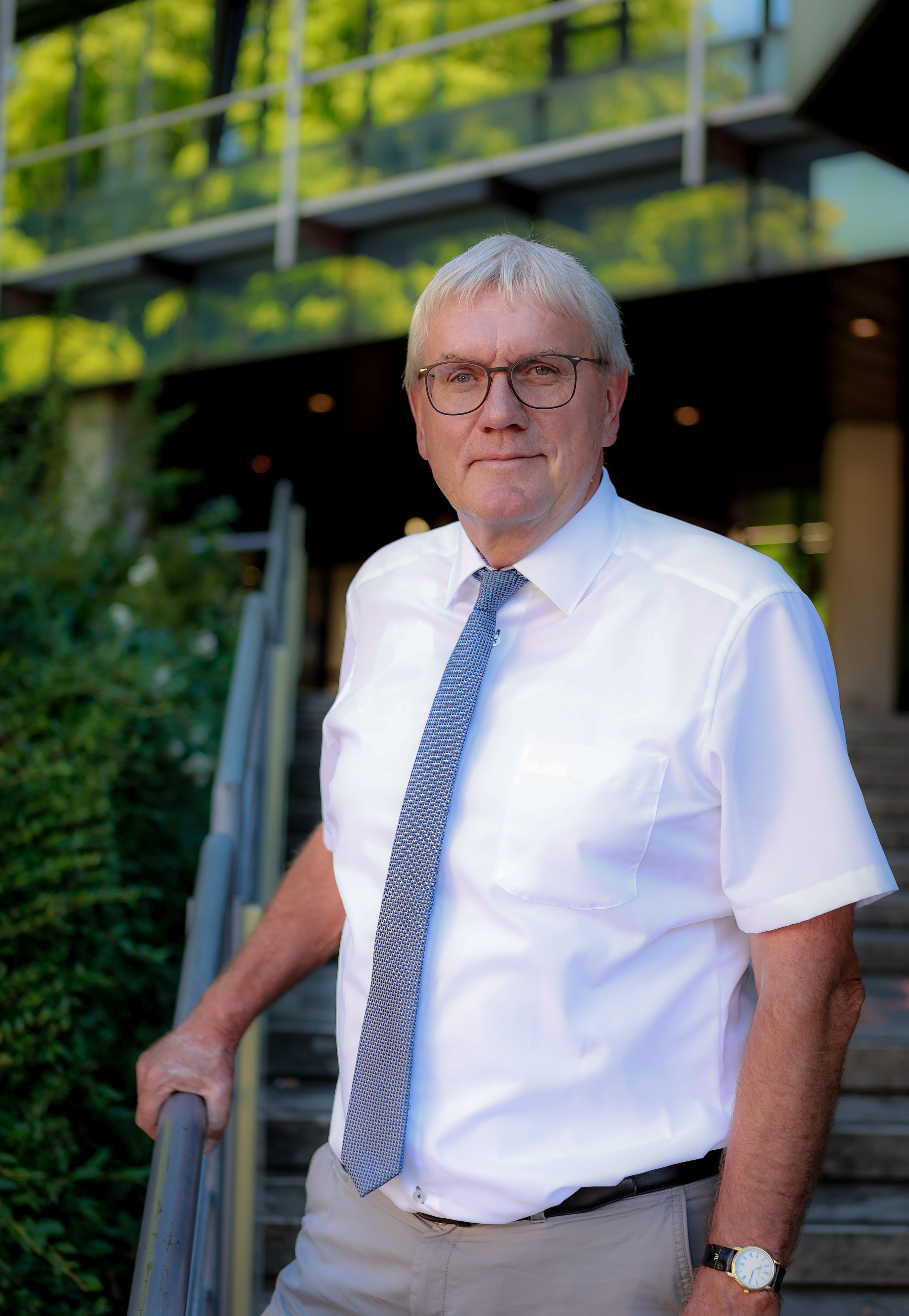 Landrat Sebastian Schuster vor dem Kreishaus in Siegburg (2020)(Foto: Oliver Hoecker)